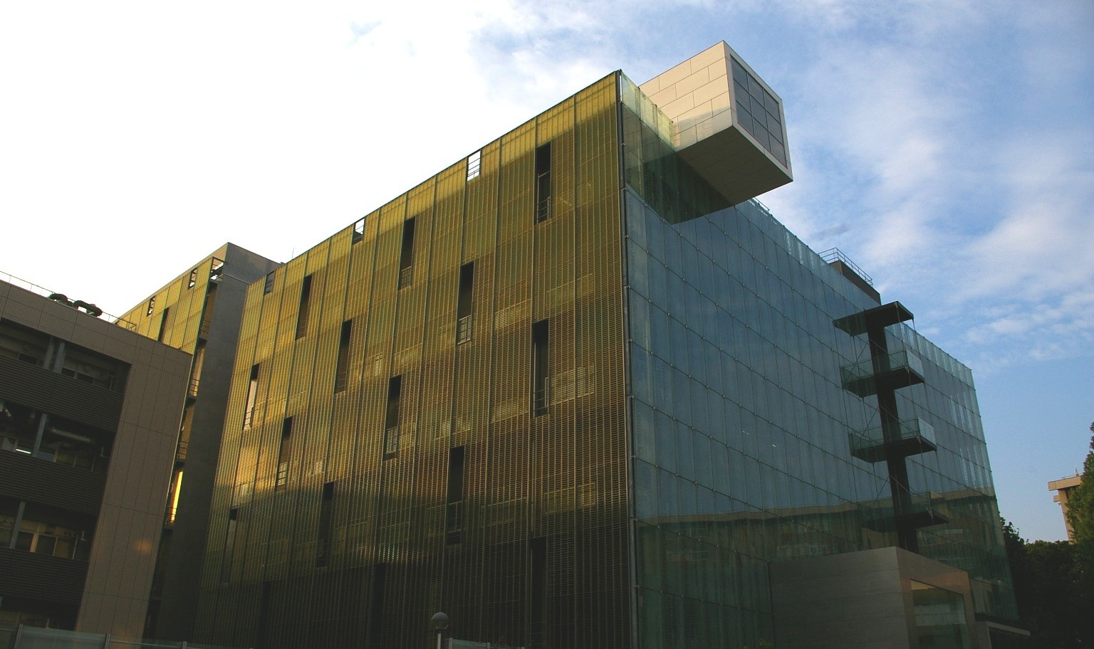 愛知県名古屋市